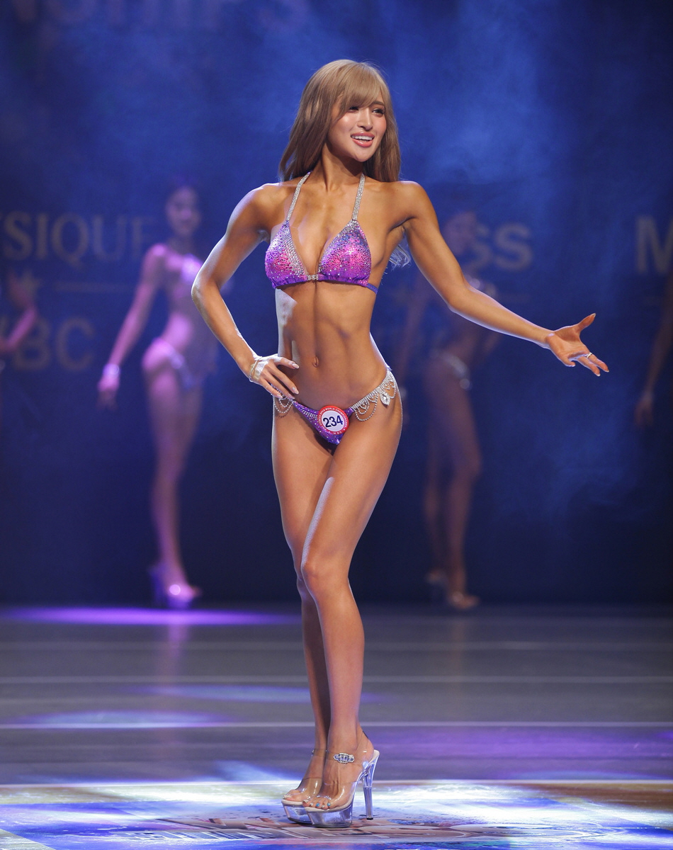 2017 WBC 피트니스 오픈 월드 챔피언십 여자모델종목 3라운드 비키니웨어 +162